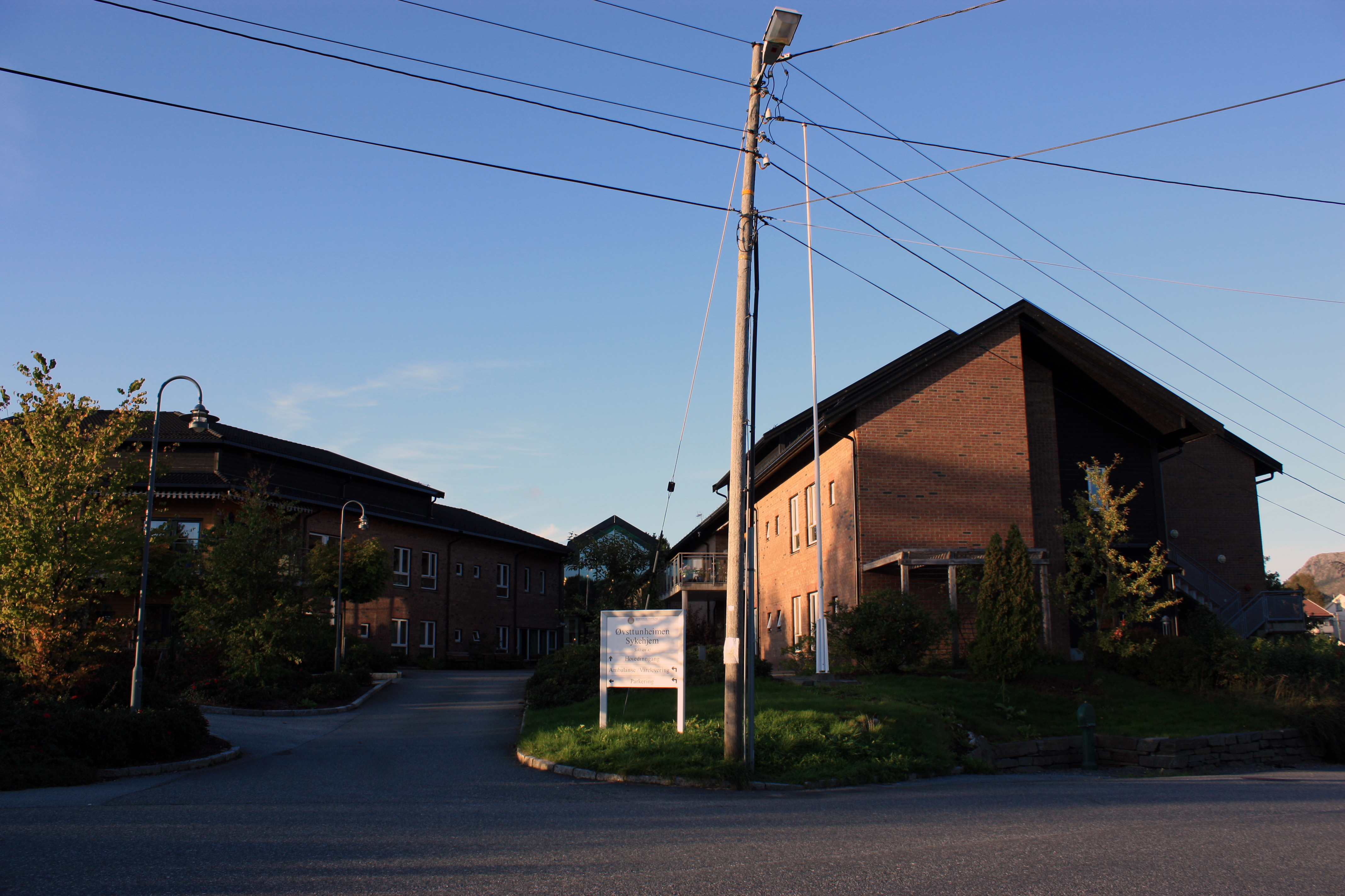 Øvsttunheimen nursing home, Fana, Bergen.